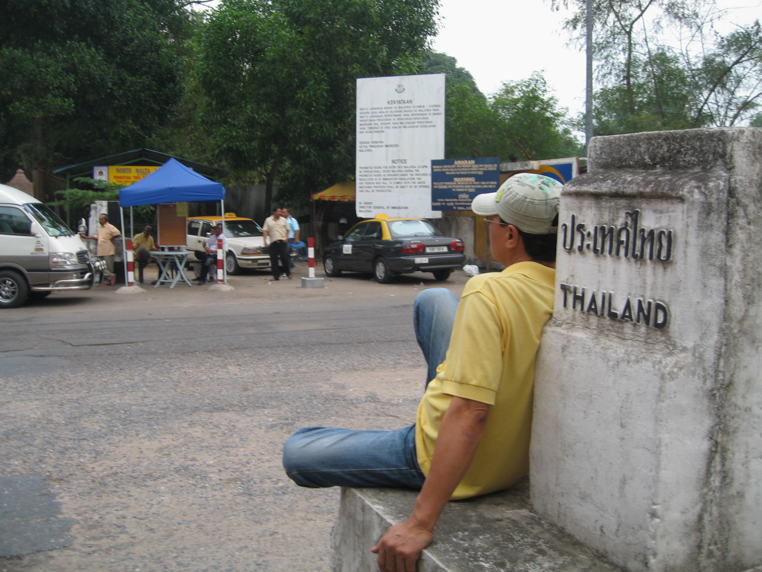 Malaysia-Thailand boundary stone at Bukit Kayu Hitam-Sadao